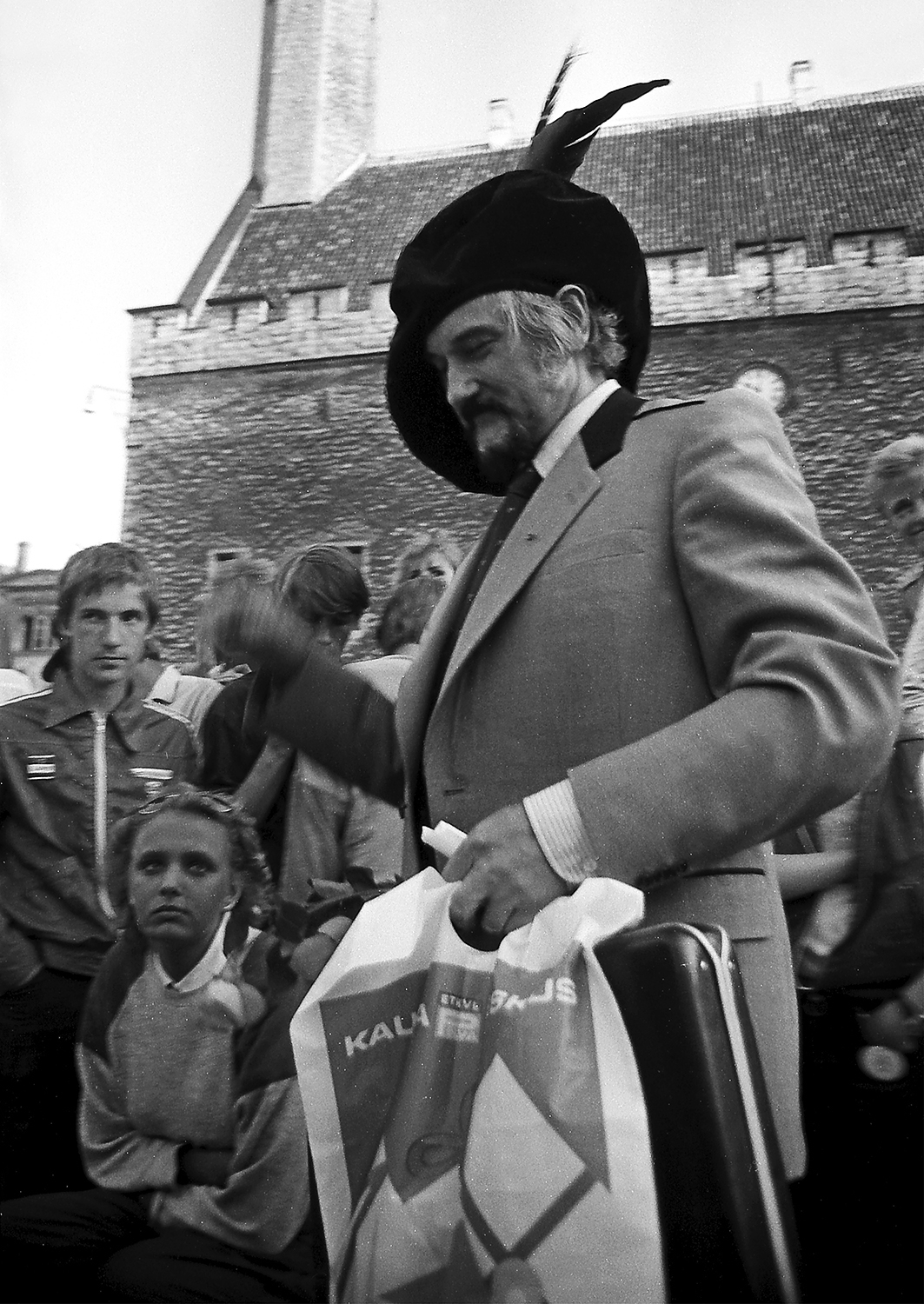 Hugo Hiibus Vanalinna päevadel 86